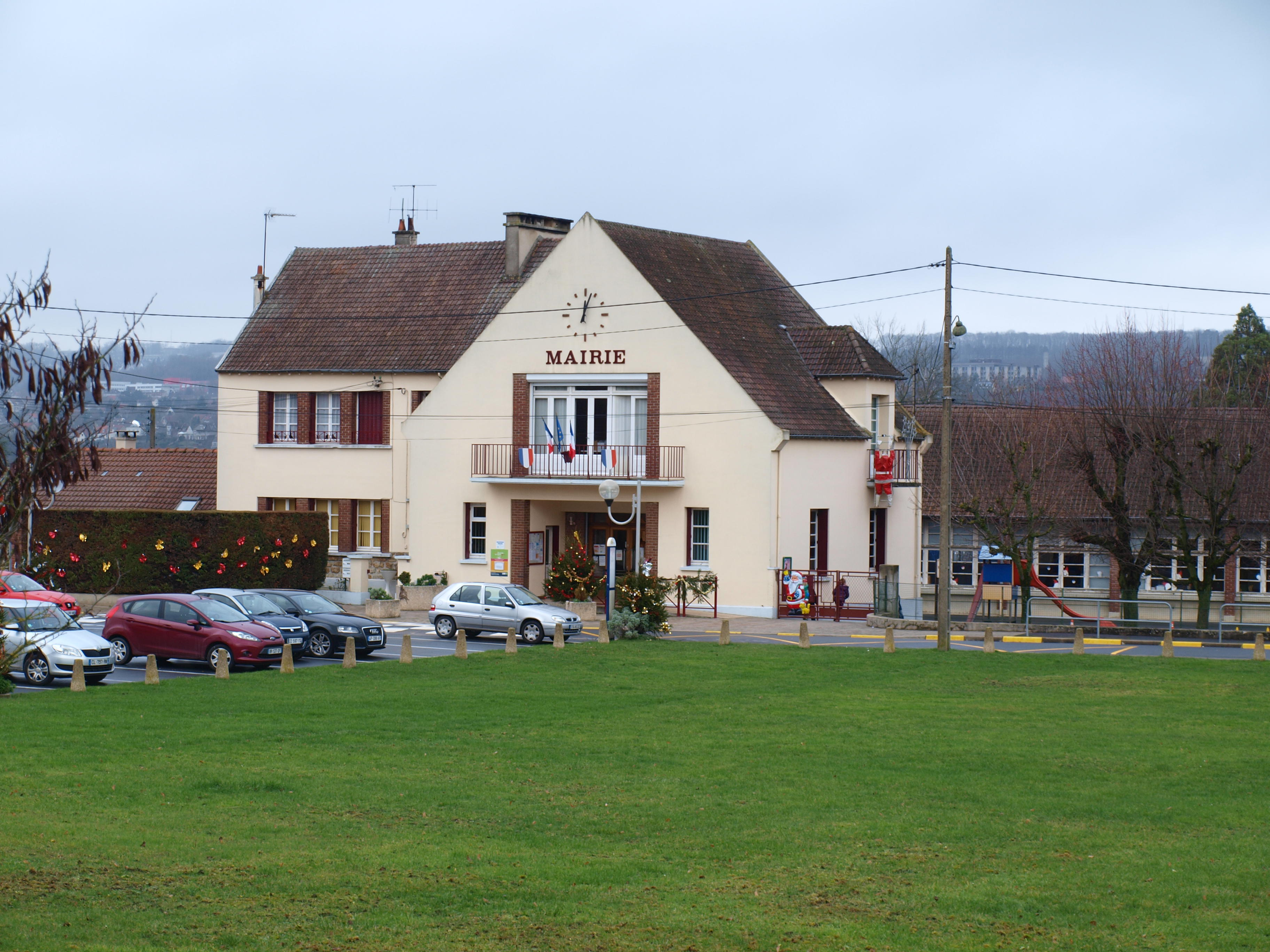 Chierry (Aisne, France) ; mairie